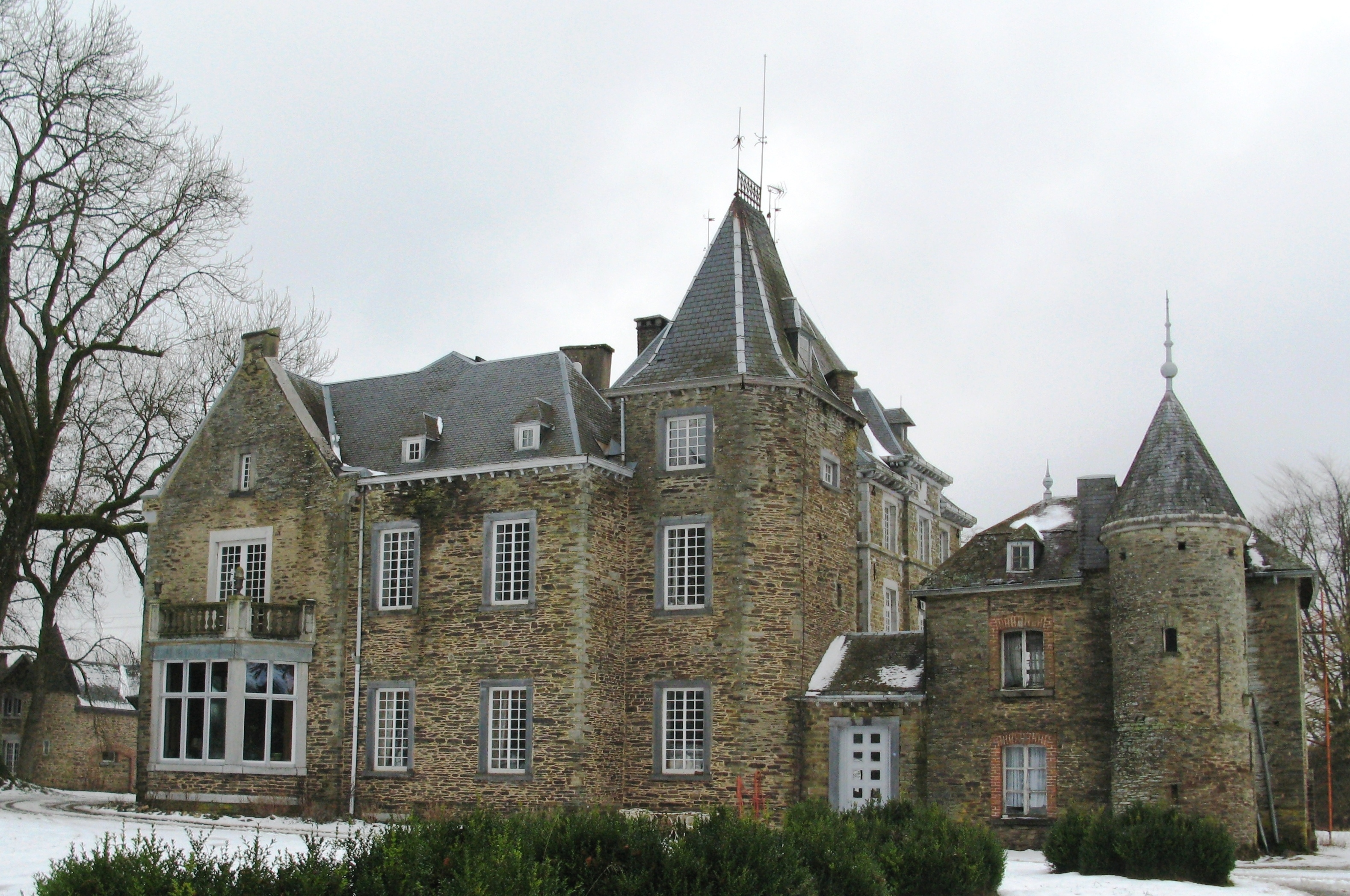 Château au lieu-dit La Laide Fagne près de Steinbach